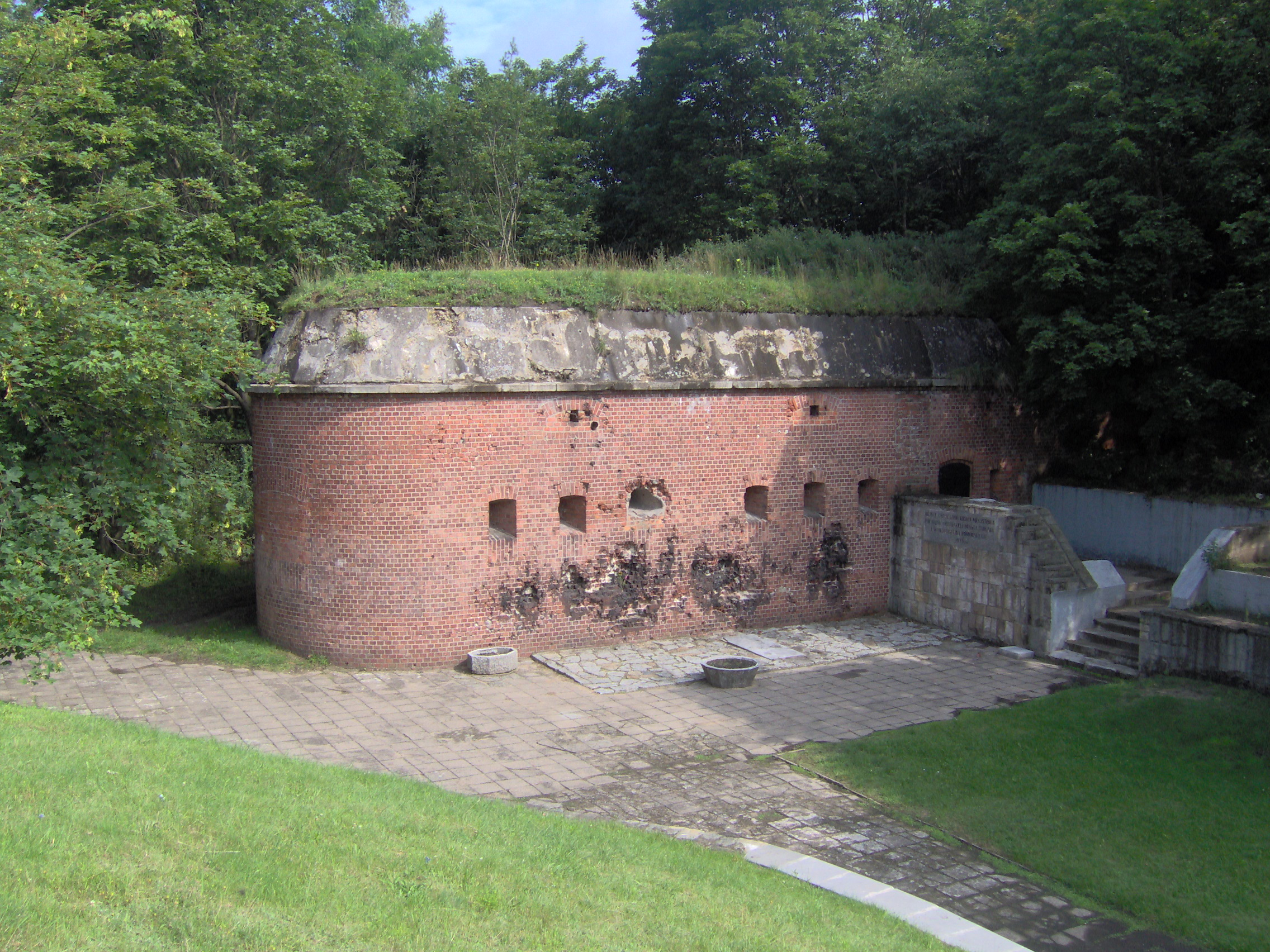 Kaponiera barkowa Fortu VII Twierdzy Toruń